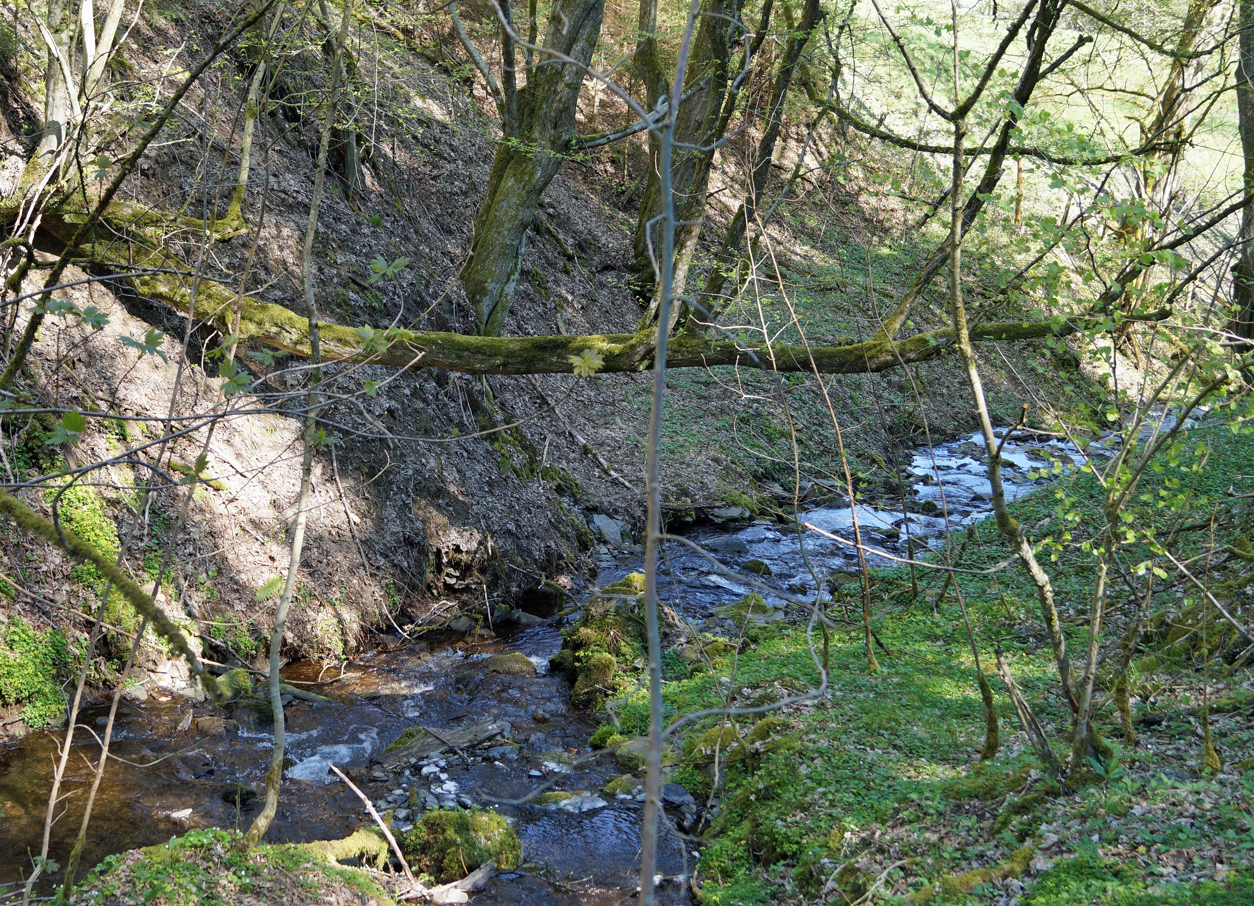 Kleine Barmicke im Naturschutzgebiet Waldreservat Schanze (NSG HSK-528, BK-4815-0022) bei Latrop (Schmallenberg), kurz vor der Mündung in die Latrop